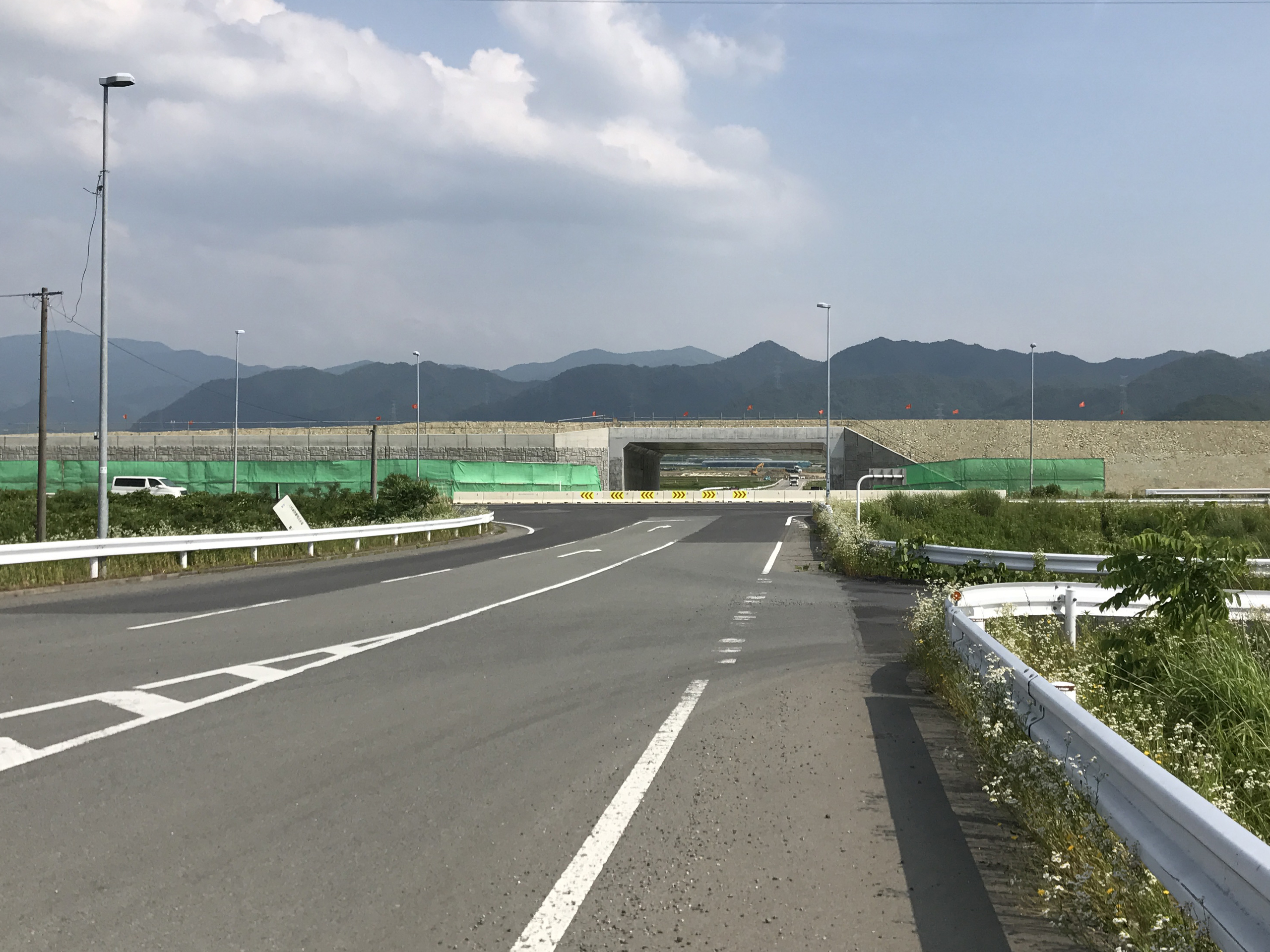 建設中の東北中央自動車道 上山IC